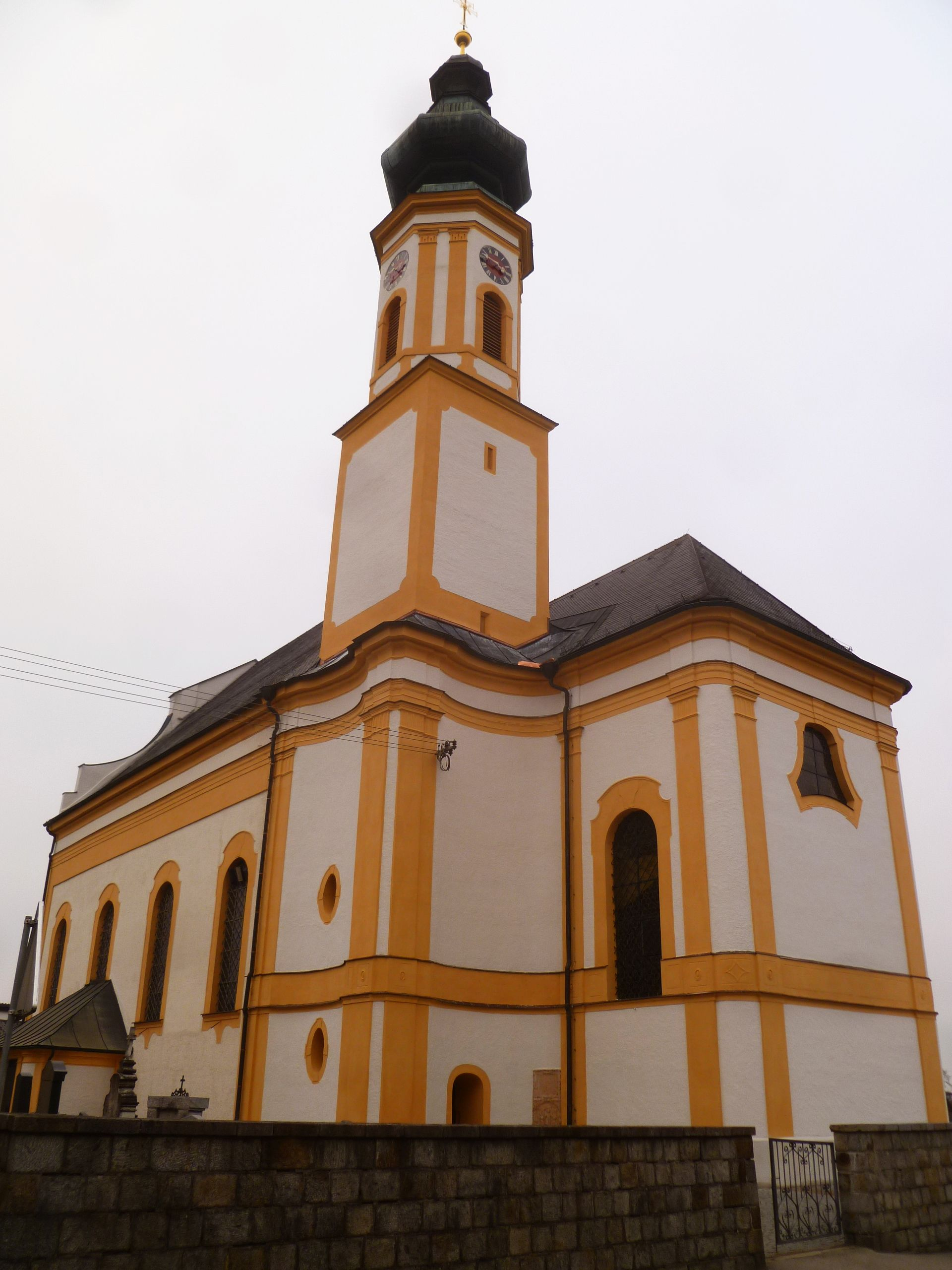 Kath. Pfarrkirche hl. Stephan und Friedhof